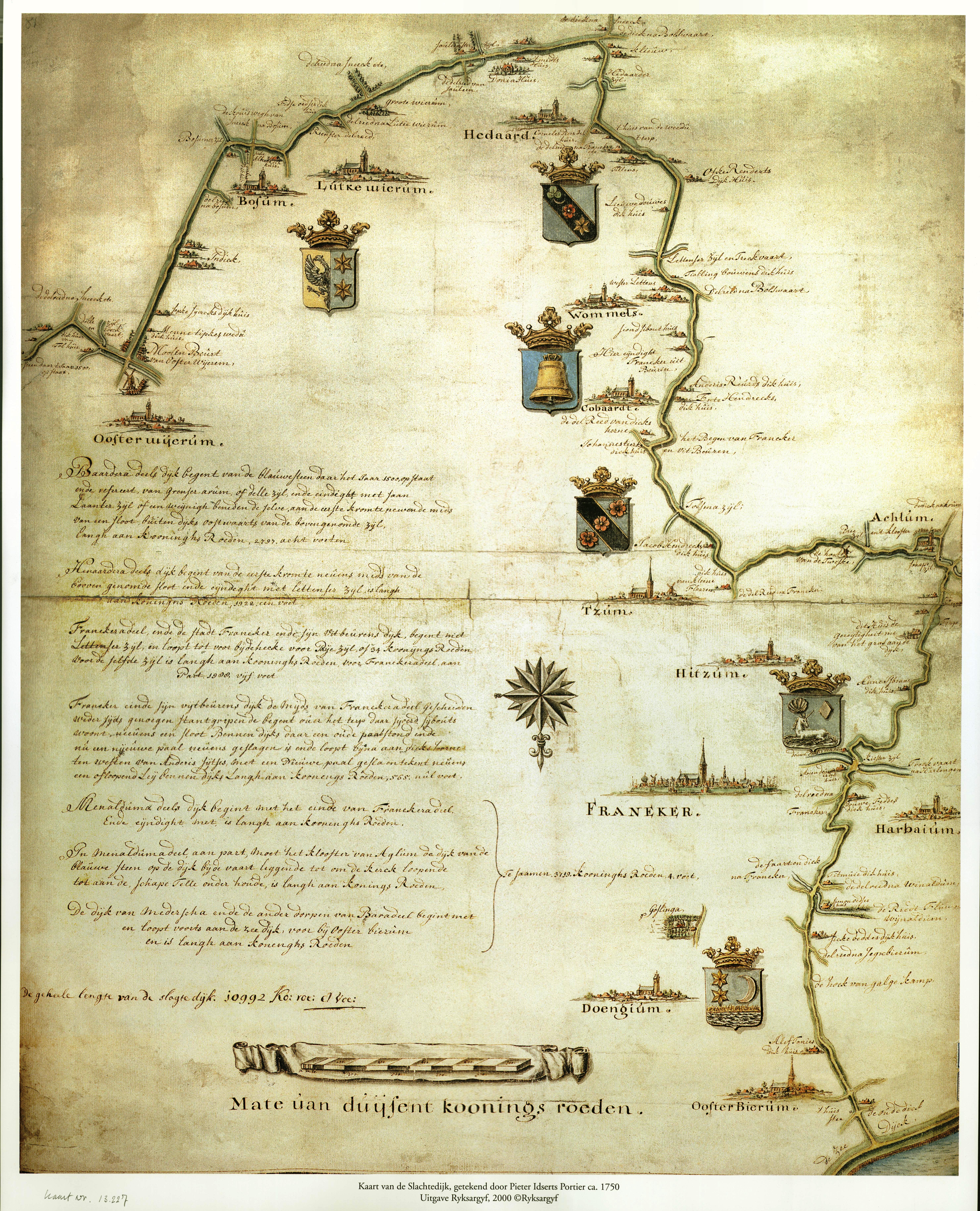 Deze tekening toont de slaperdijk Slachte met de dijkhuizen, de wapens van de gemeenten en een uitgebreide beschrijving.